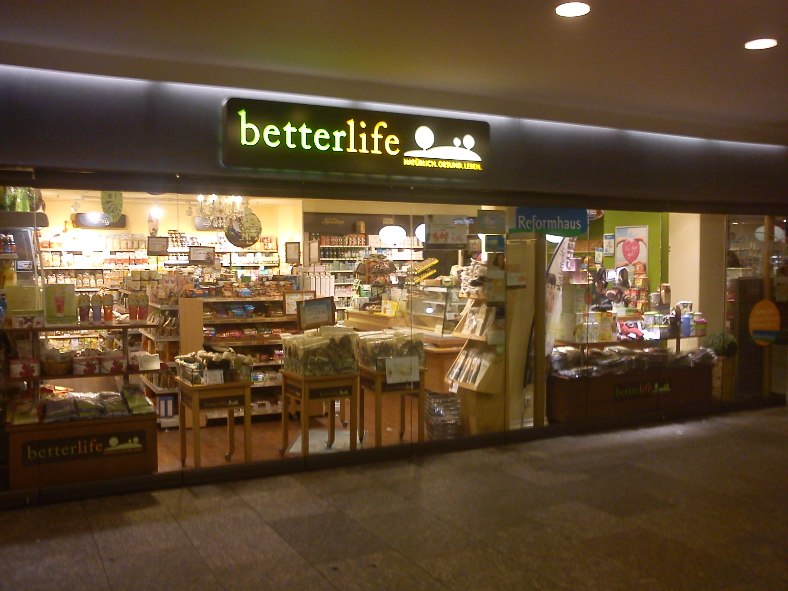 Mischform Bioladen und Reformhaus